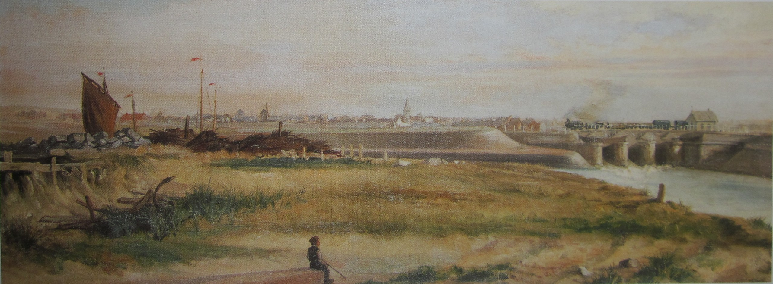 Schilderij van Edmond Van der Haeghen (1836-1919). Havengeul van Blankenberge, tram over de sasbrug en in de verte de molen en de kerk van Uitkerke.